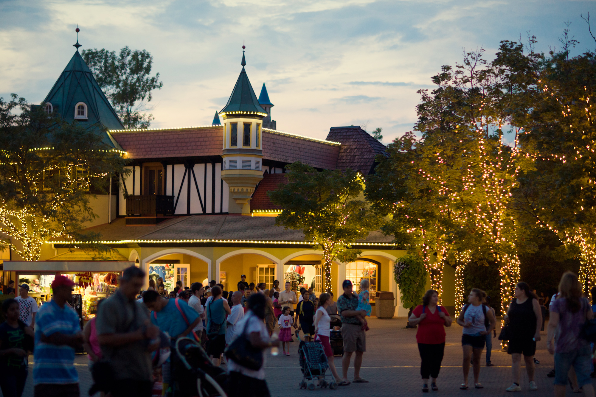 2011, Canada. Toronto.